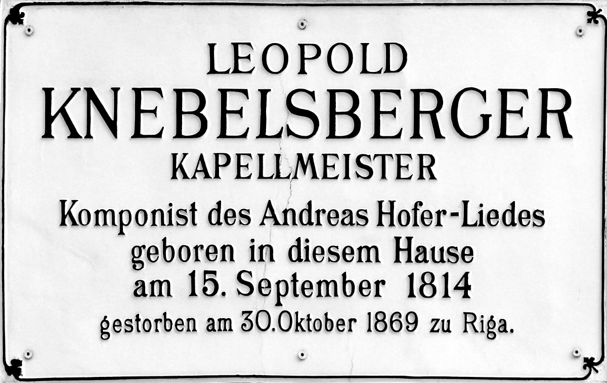 Gedenktafel an den Komponisten Leopold Knebelsberger in Klosterneuburg